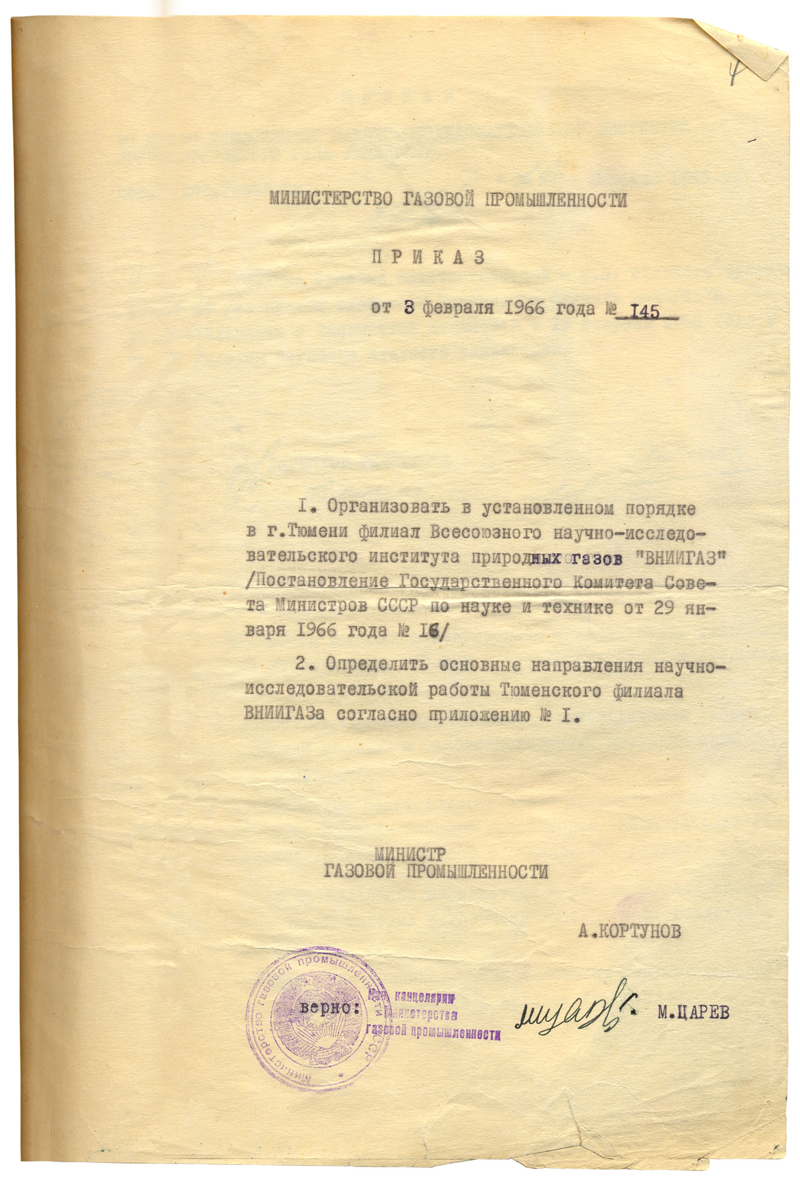 Приказ о создании Тюменского филиала ВНИИГАЗ (с 1973 года ТюменНИИгипрогаз). 1966 год.